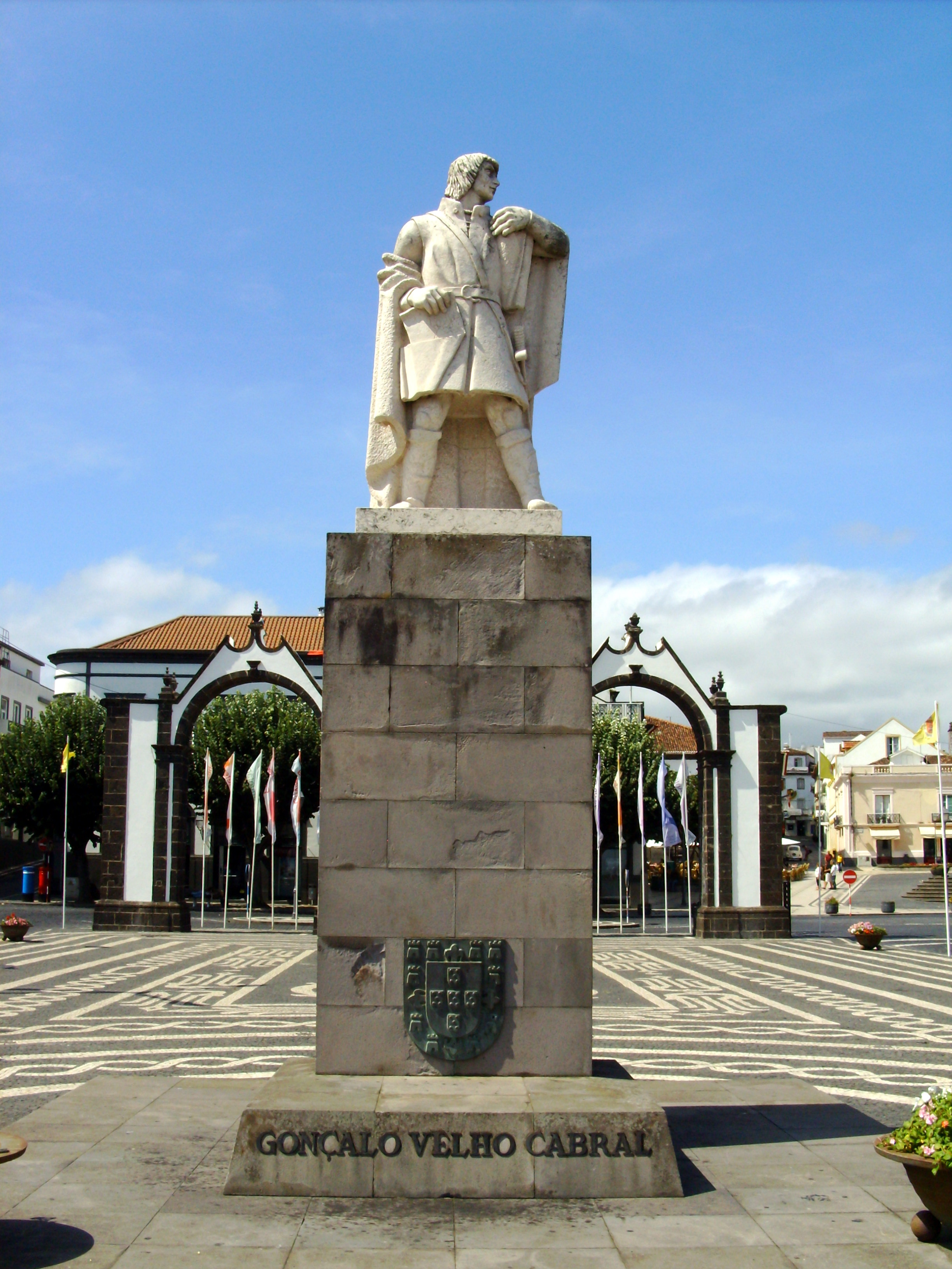 Monumento em homenagem a Gonçalo Velho Cabral, de autoria de Numídico Bessone, na praça de Gonçalo Velho, Ponta Delgada, ilha de São Miguel, Açores. Ao fundo, as Portas da Cidade de Ponta Delgada.